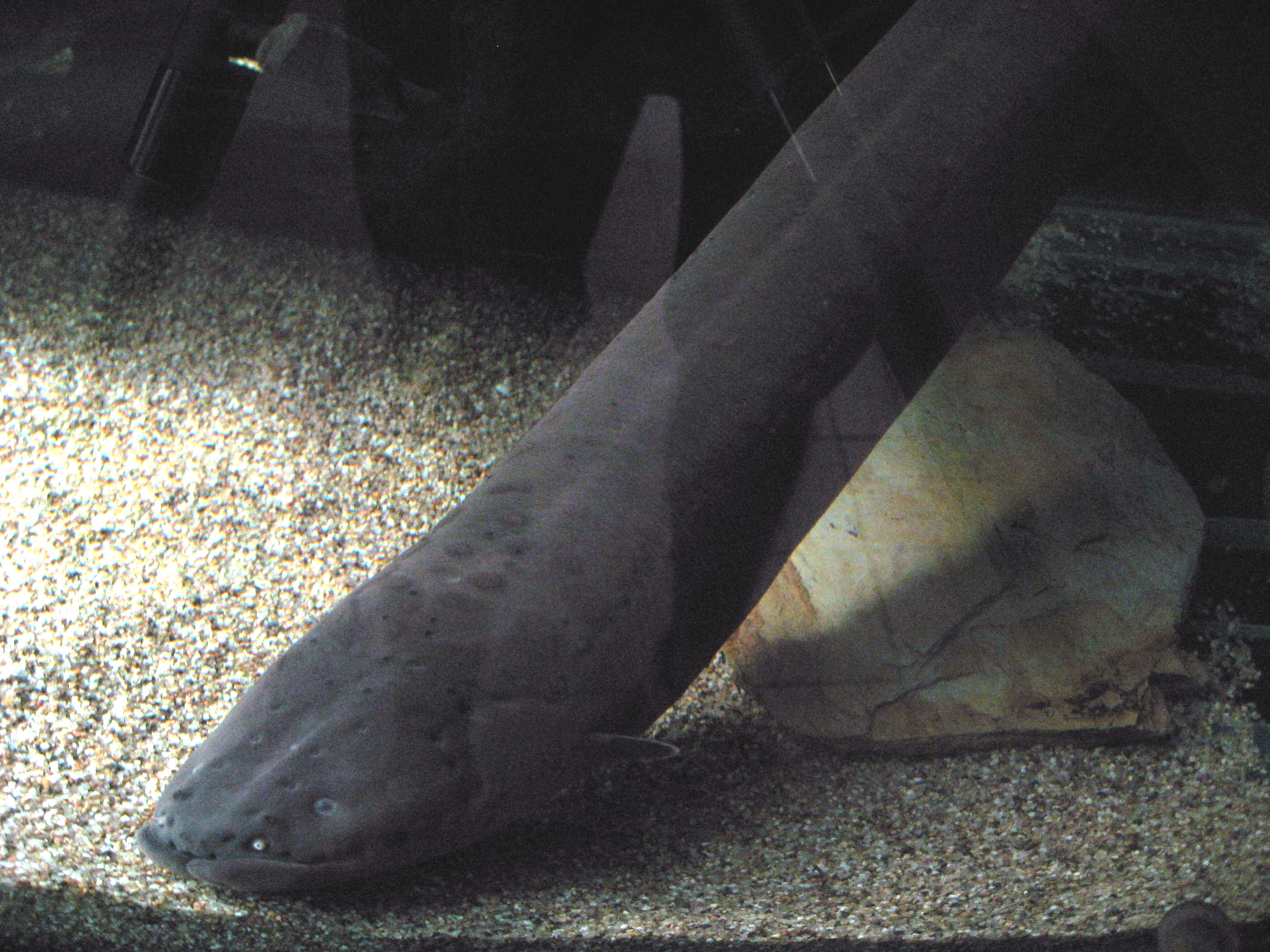 Electrophorus electricus in Muséum-aquarium de Nancy Map: 48° 41' 41" N 6° 11' 18" E